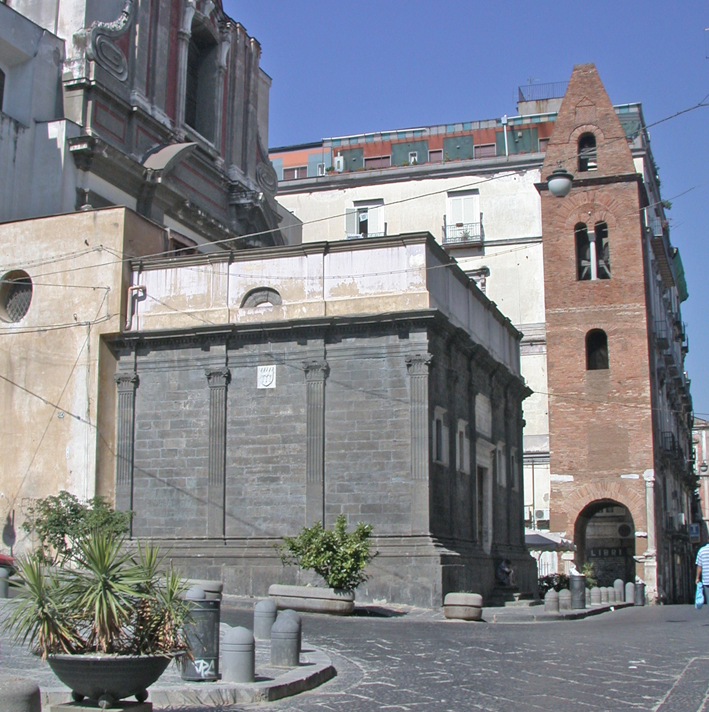 Italia, regione Campania, Napoli, Cappella dei Pontano e campanile di Santa Maria Maggiore.